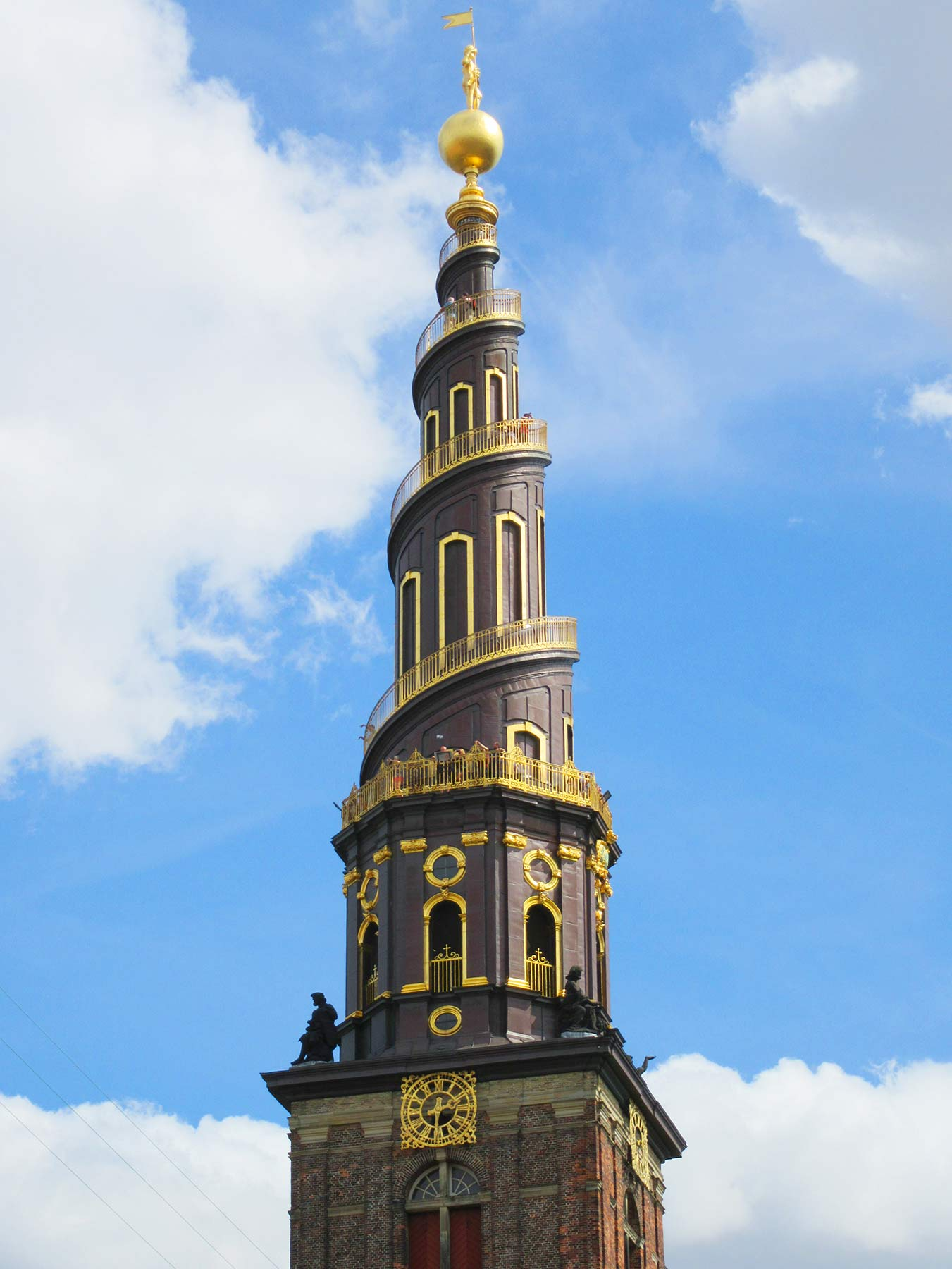 Copenhagen seen during a Viking Sun cruise, August 2018.